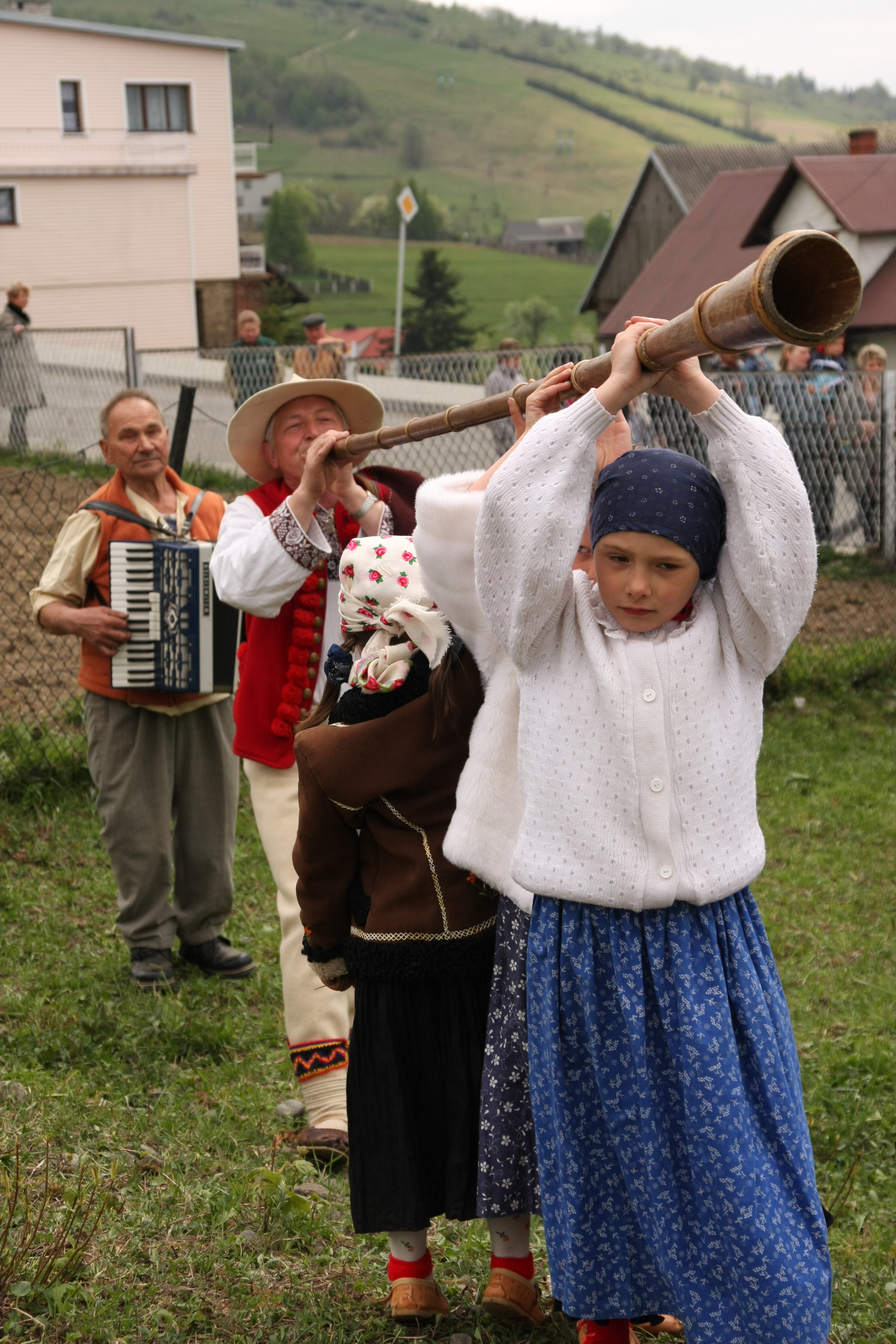 Corocznie w Koniakowie z początkiem maja odbywa się wiosenny redyk tzw. miyszanie owiec, podczas którego kilka mniejszych stad łączy się w jedno wielkie. Gazdowie oddają pod opiekę swoje stada bacy, który wraz z juhasami wyrusza na redyk na Ochodzitą. W tym dniu można zobaczyć odświętne regionalne stroje, usłyszeć głos trombity oraz zobaczyć pastereskie zwyczaje np. poświęcenie stada, okadzanie koszora i miyszani owiec wokół moja ustawionego na szczycie Ochodzitej.